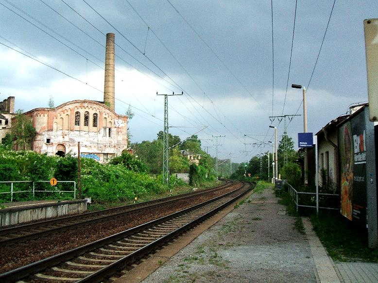 ehemalige Fabrik Hugo Morgenstern in Dresden-Cotta an DB Haltepunkt